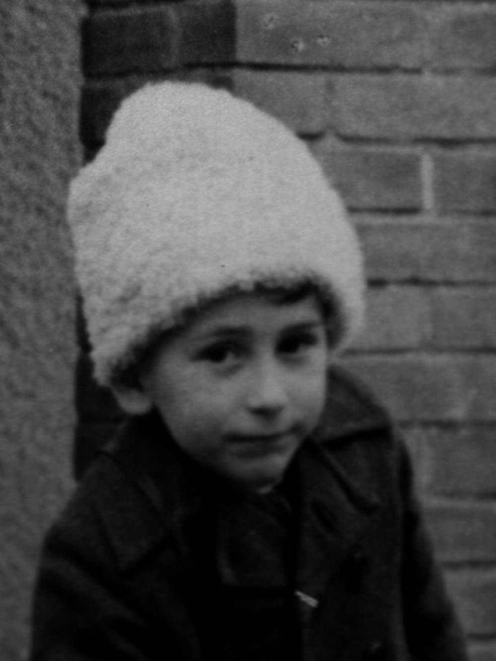 Small boy wearing Romanian fur hat (căciulă)